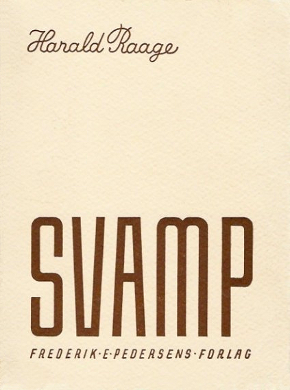 Omslag til romanen Svamp (1934) af Harald Raage (1883-1951)